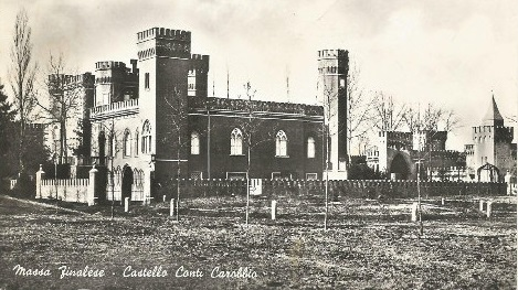 Massa Finalese - Castello Conti Carobbio